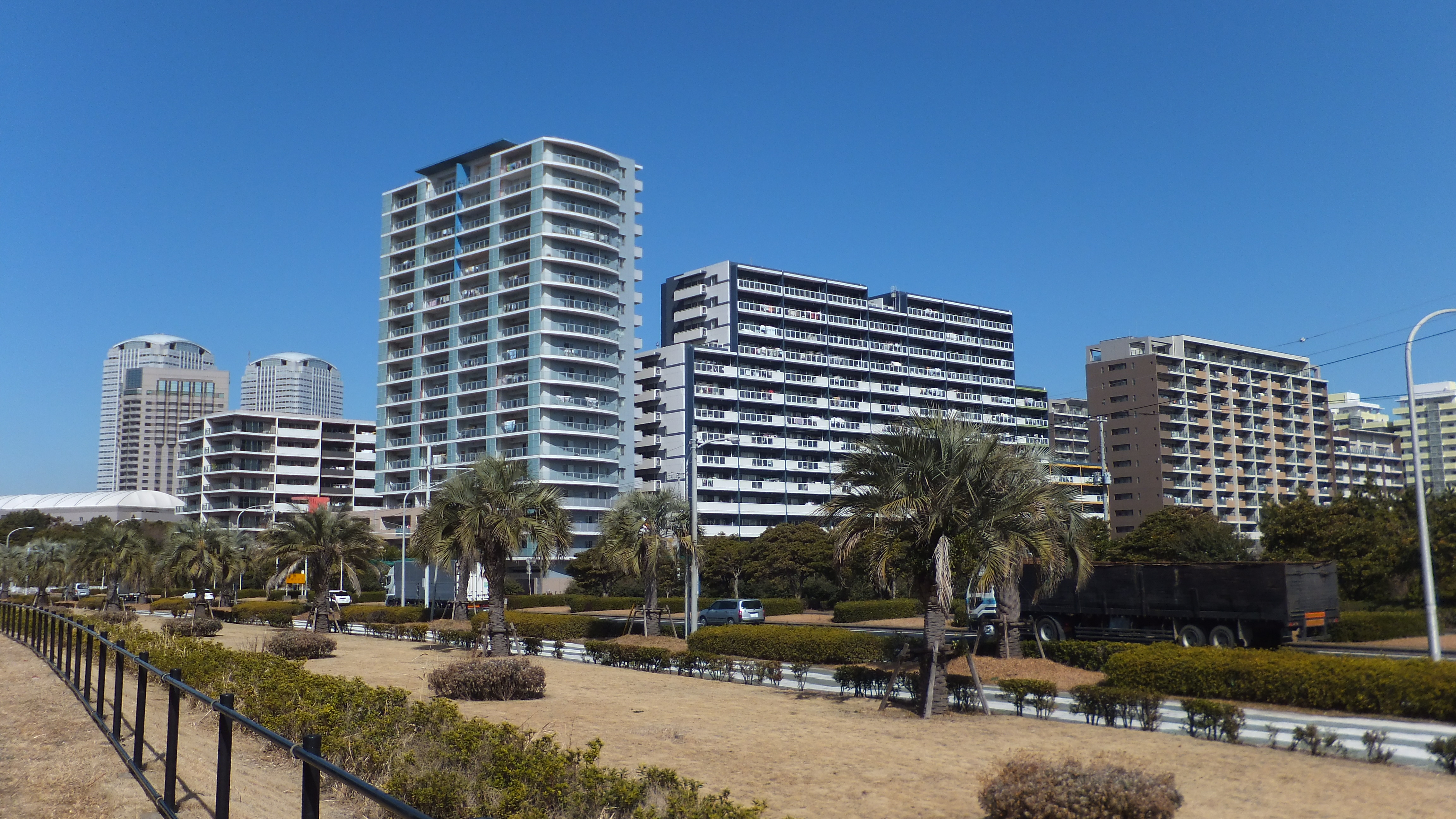 海浜大通りからみた幕張ベイタウン